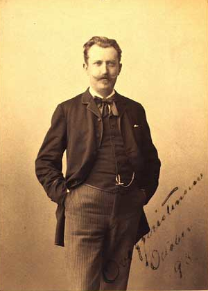 Pianist Ove Christiansen